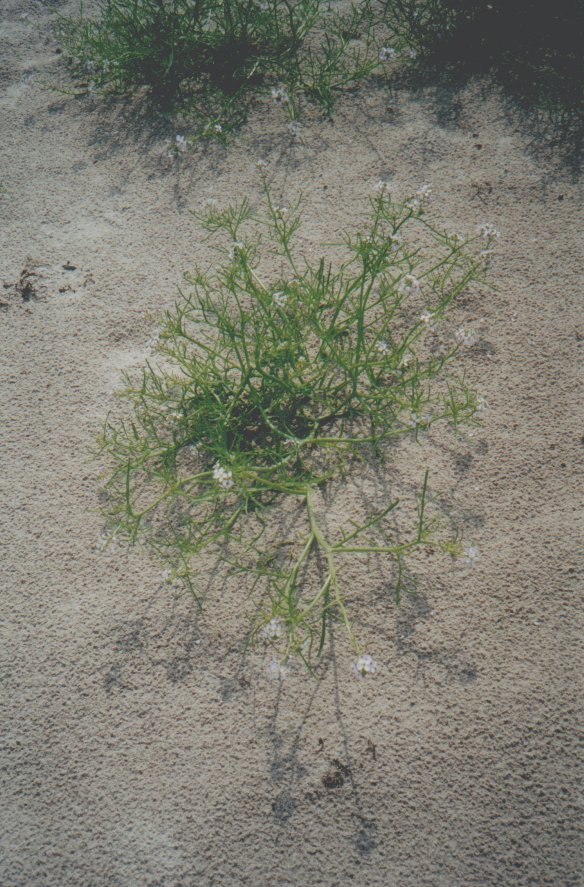 Cakile maritima on Aegna (island of Estonia). Pomořanka přímořská (cakile maritima) na severním pobřeží ostrova Aegna.